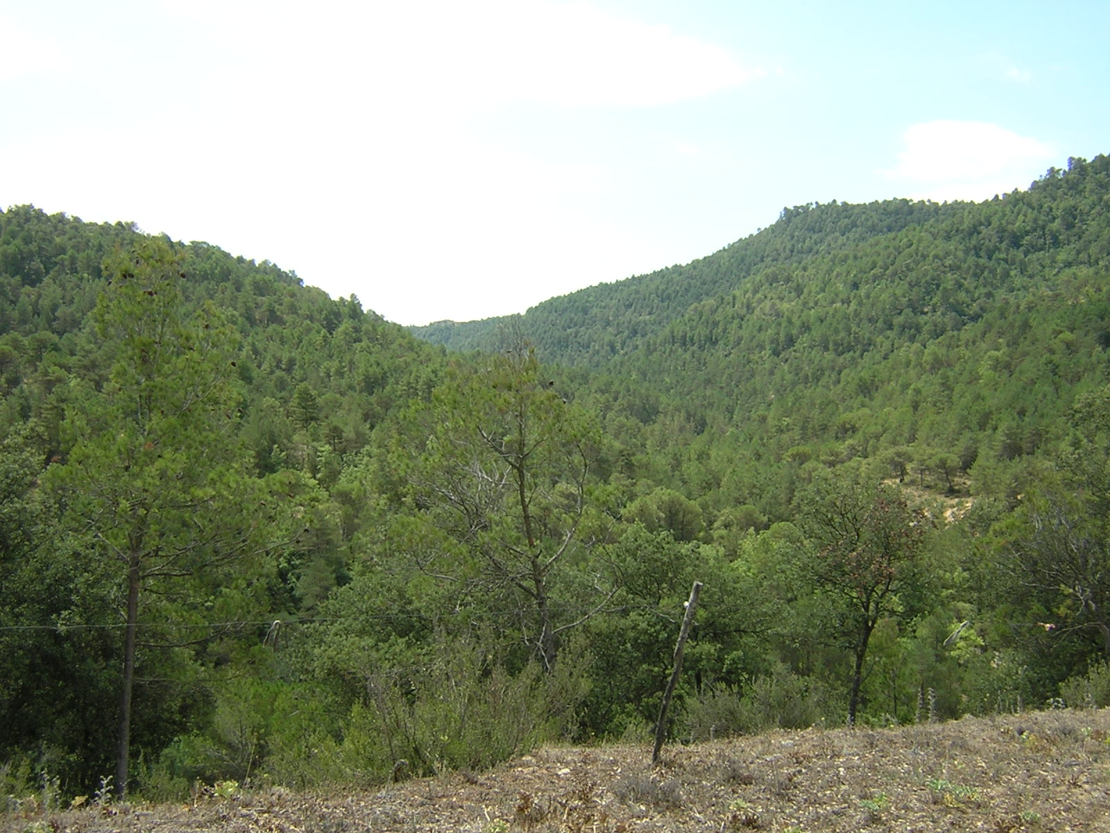 La Baga del Coll (Monistrol de Calders, Moianès)